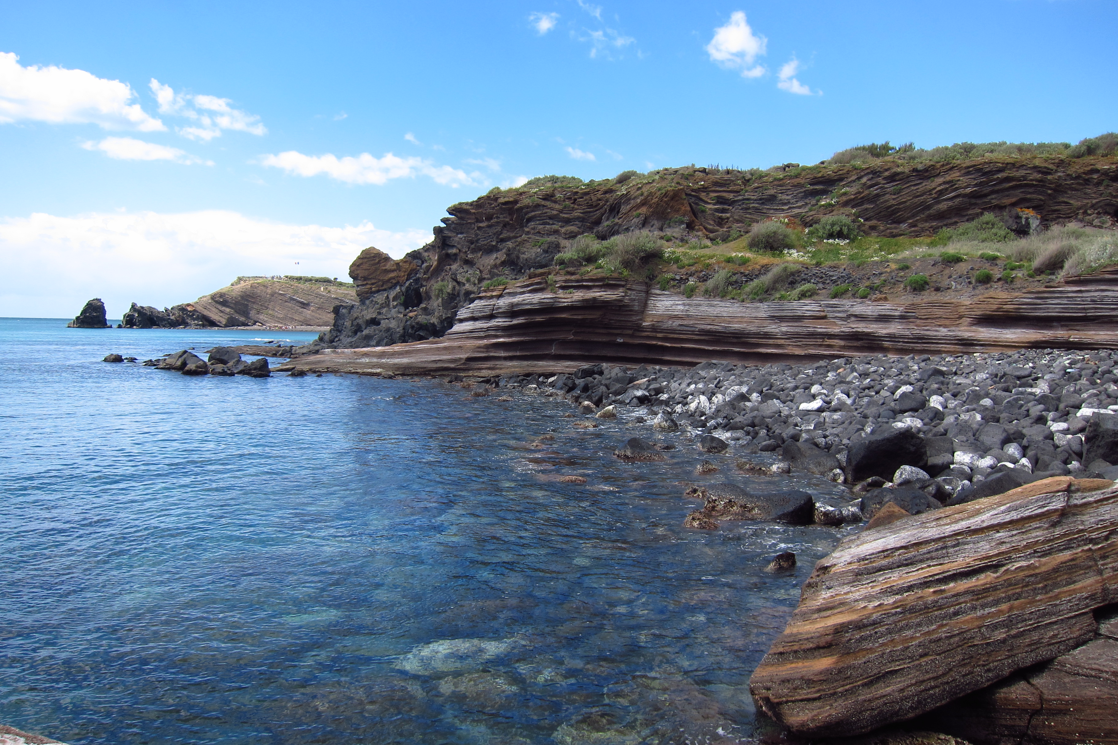 Agde (Hérault, Languedoc-Roussillon, France) : Le Volcan d'Agde.